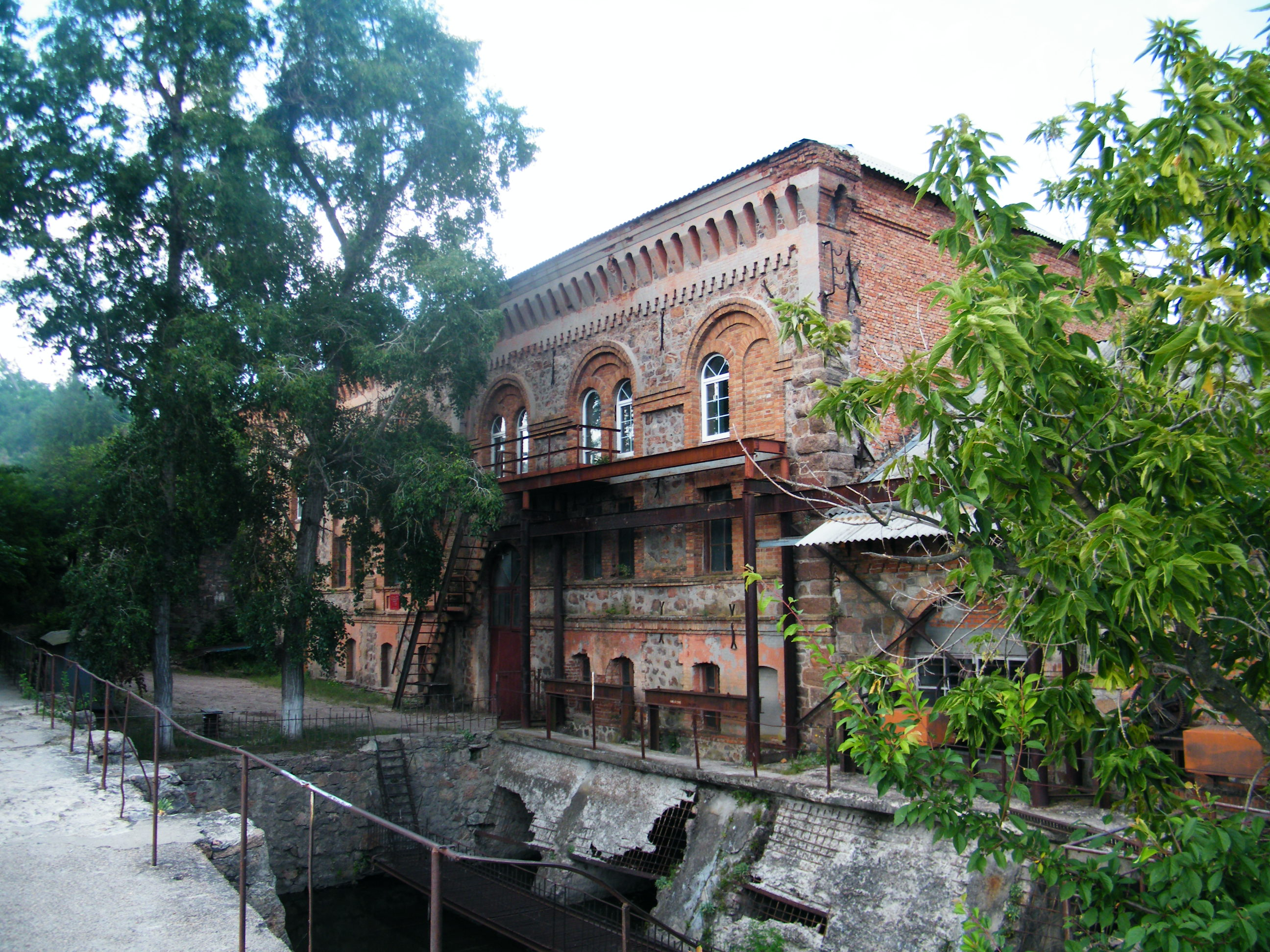 Мигійська ГЕС